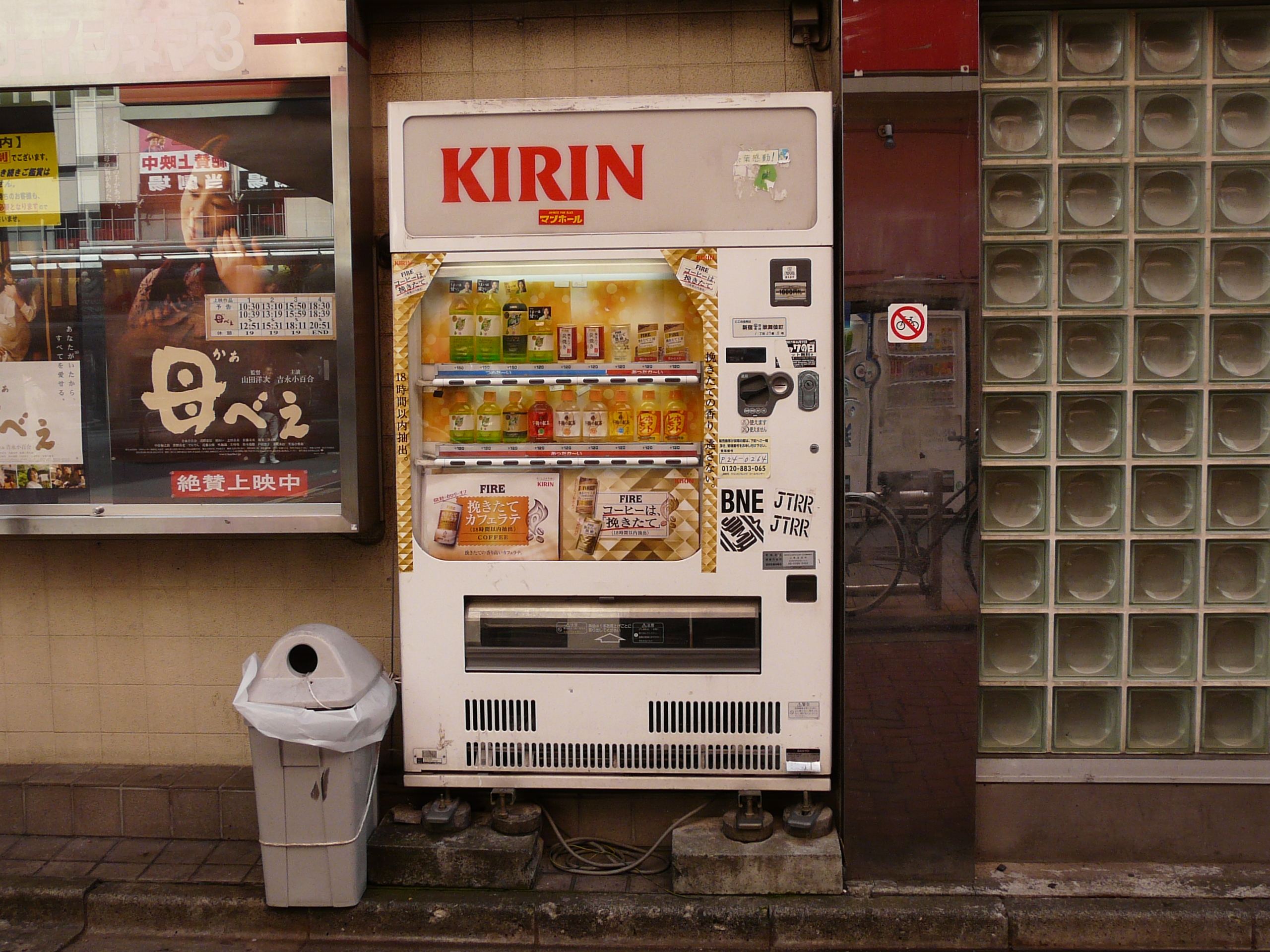 新宿ジョイシネマの告知ポスター「母べえ」。